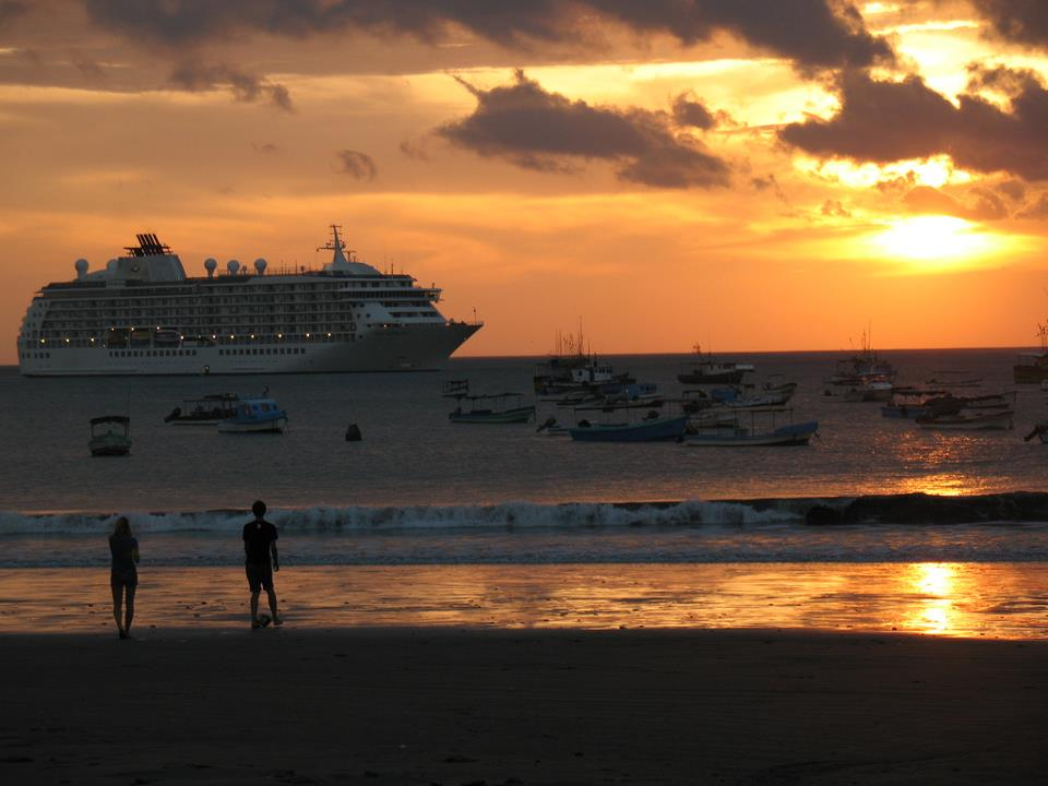 Atardecer en San Juan